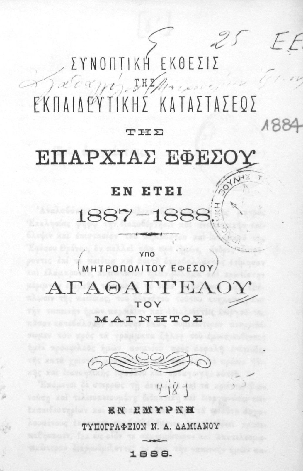 Συνοπτική έκθεσις της εκπαιδευτικής καταστάσεως της Επαρχίας Εφέσου εν έτει 1887-1888 / υπό Μητροπολίτου Εφέσου Αγαθάγγελου του Μάγνητος, 1888